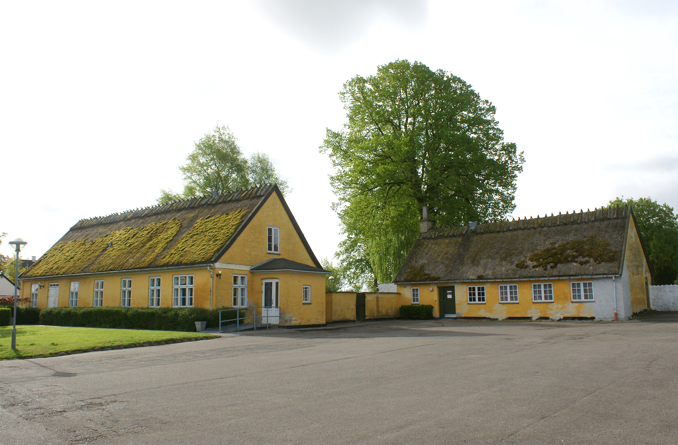 Old houses in Kirke Værløse, Furesø Municipality, Denmark fotograf: Niels Plum Ved brug af foto skal fotografens navn anføres.